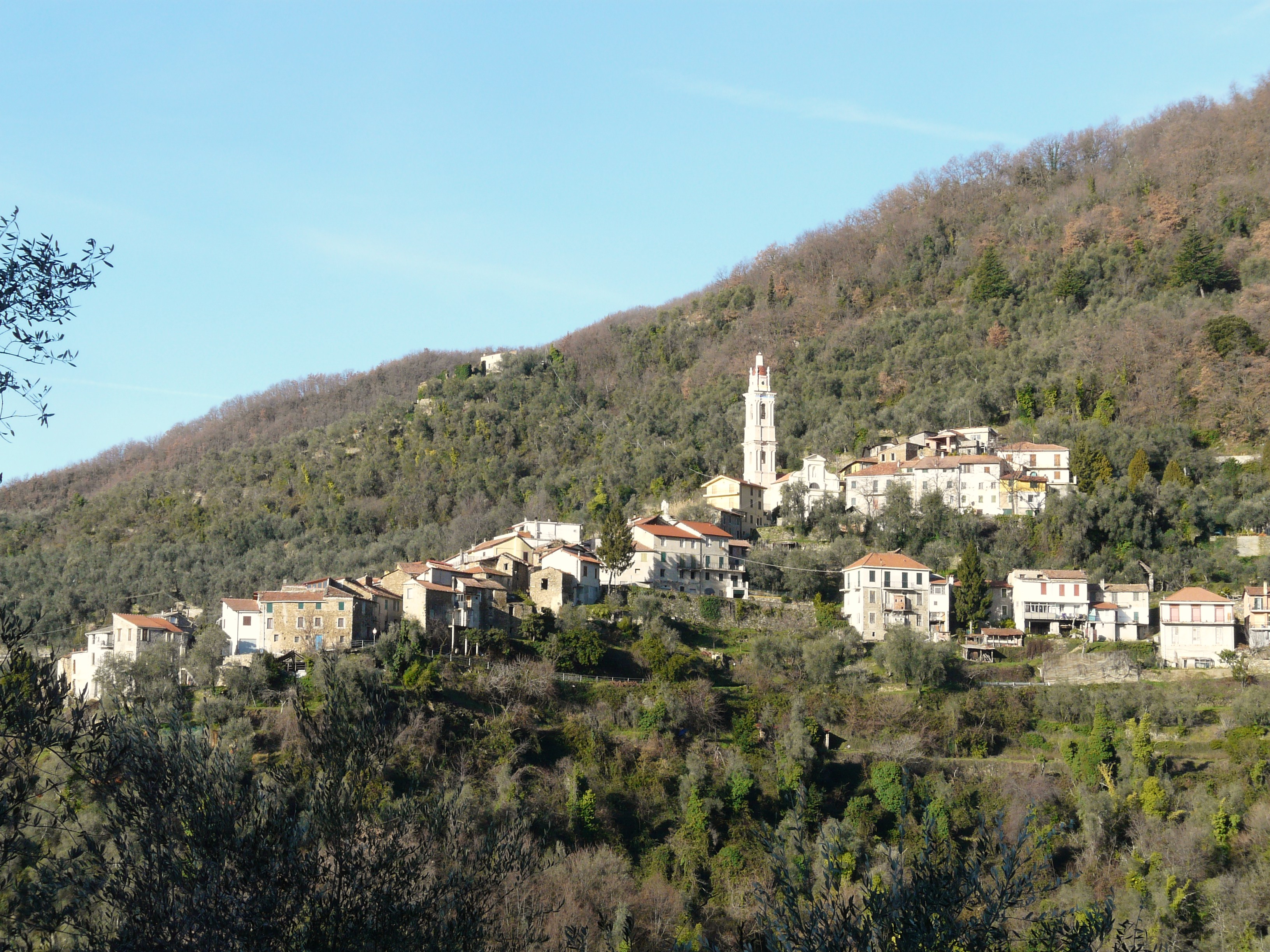 Frazione Degna di Casanova Lerrone, Liguria, Italia